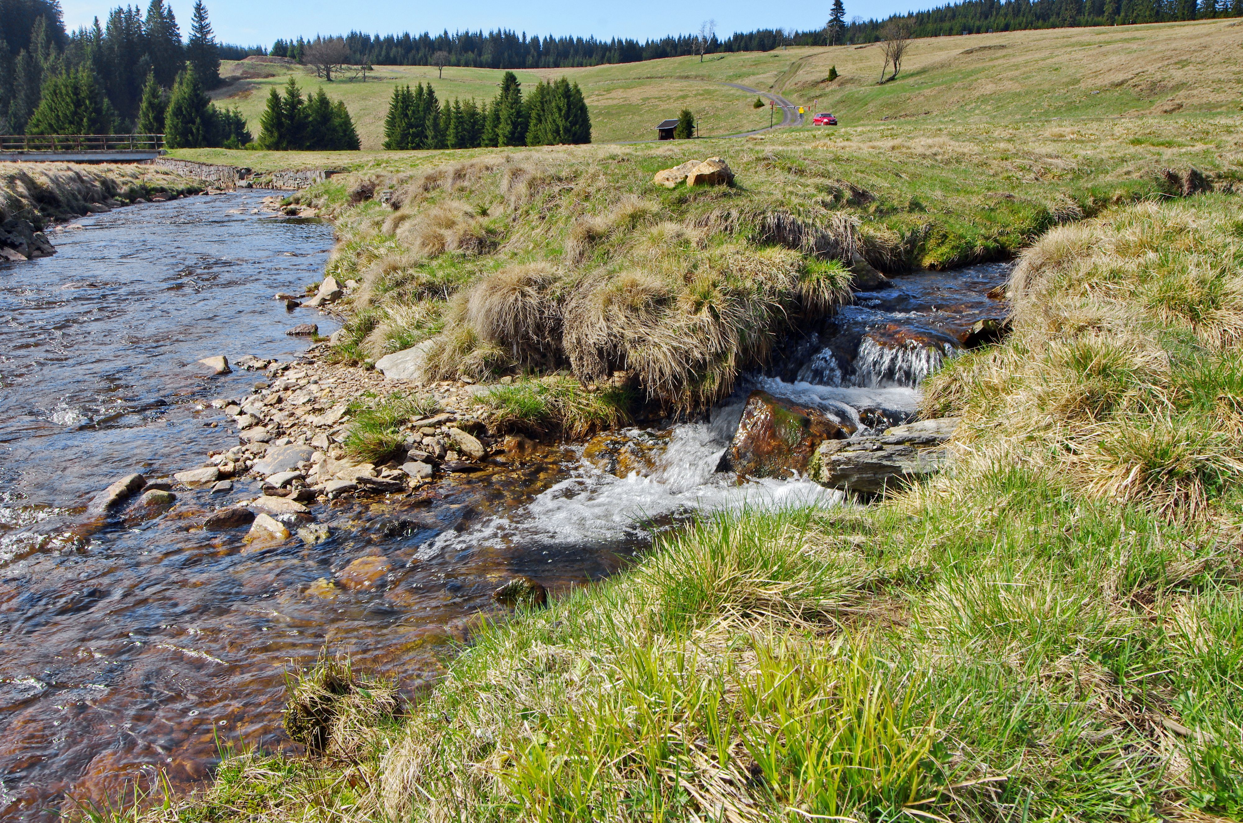 Kraví potok, přítok říčky Černá v Krušných horách, soutok u zaniklé osady Háje, okres Karlovy Vary